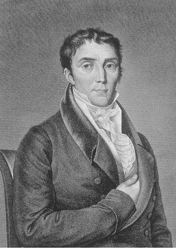 Spanischer Ministerpräsident Joaquín María Ferrer